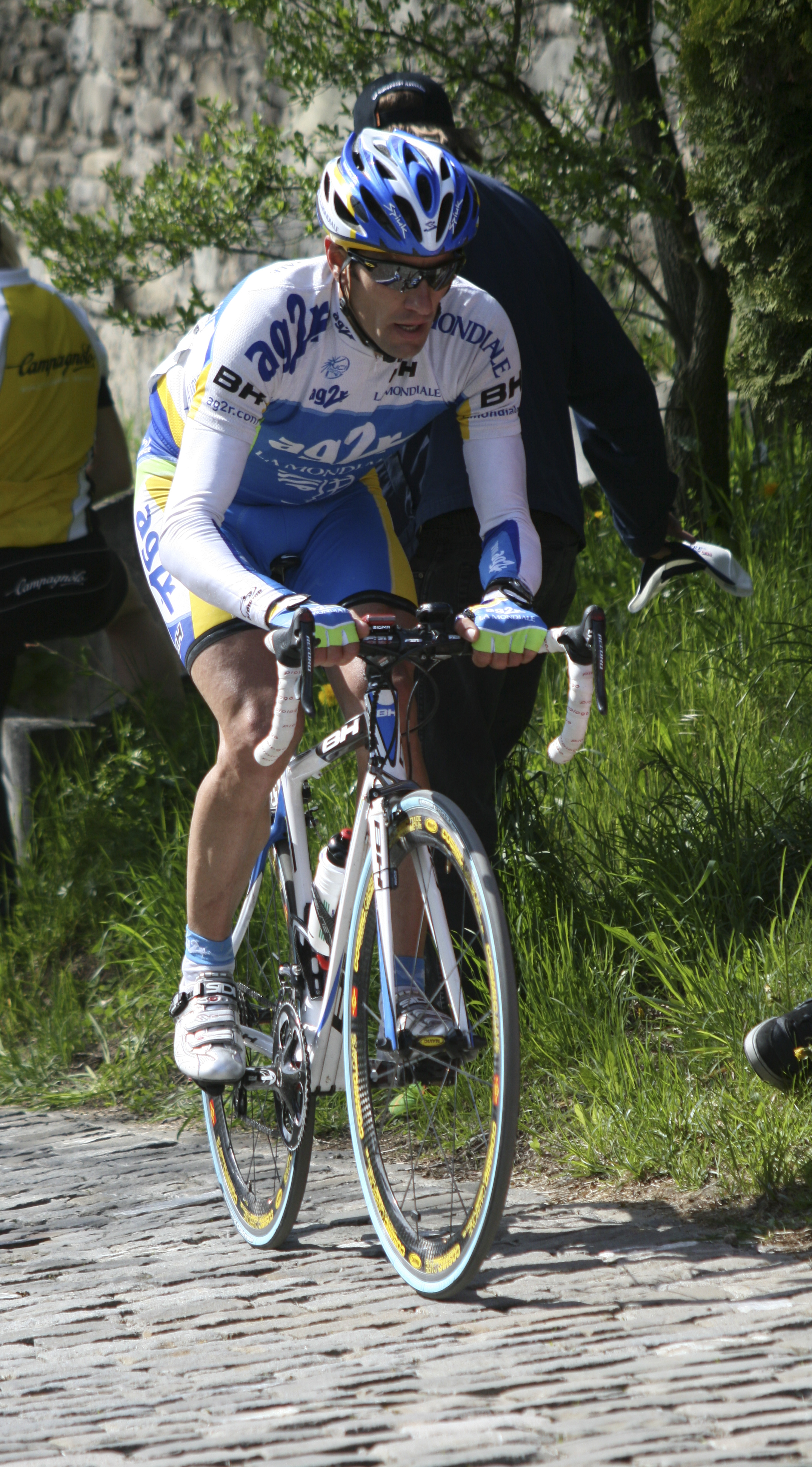 José Luis Arrieta - Fribourg Tour de Romandie 2008.